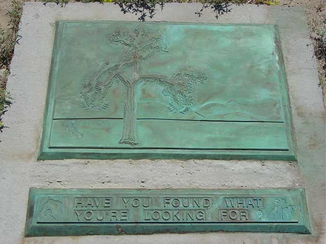 Gedenktafel am U2 Joshua Tree